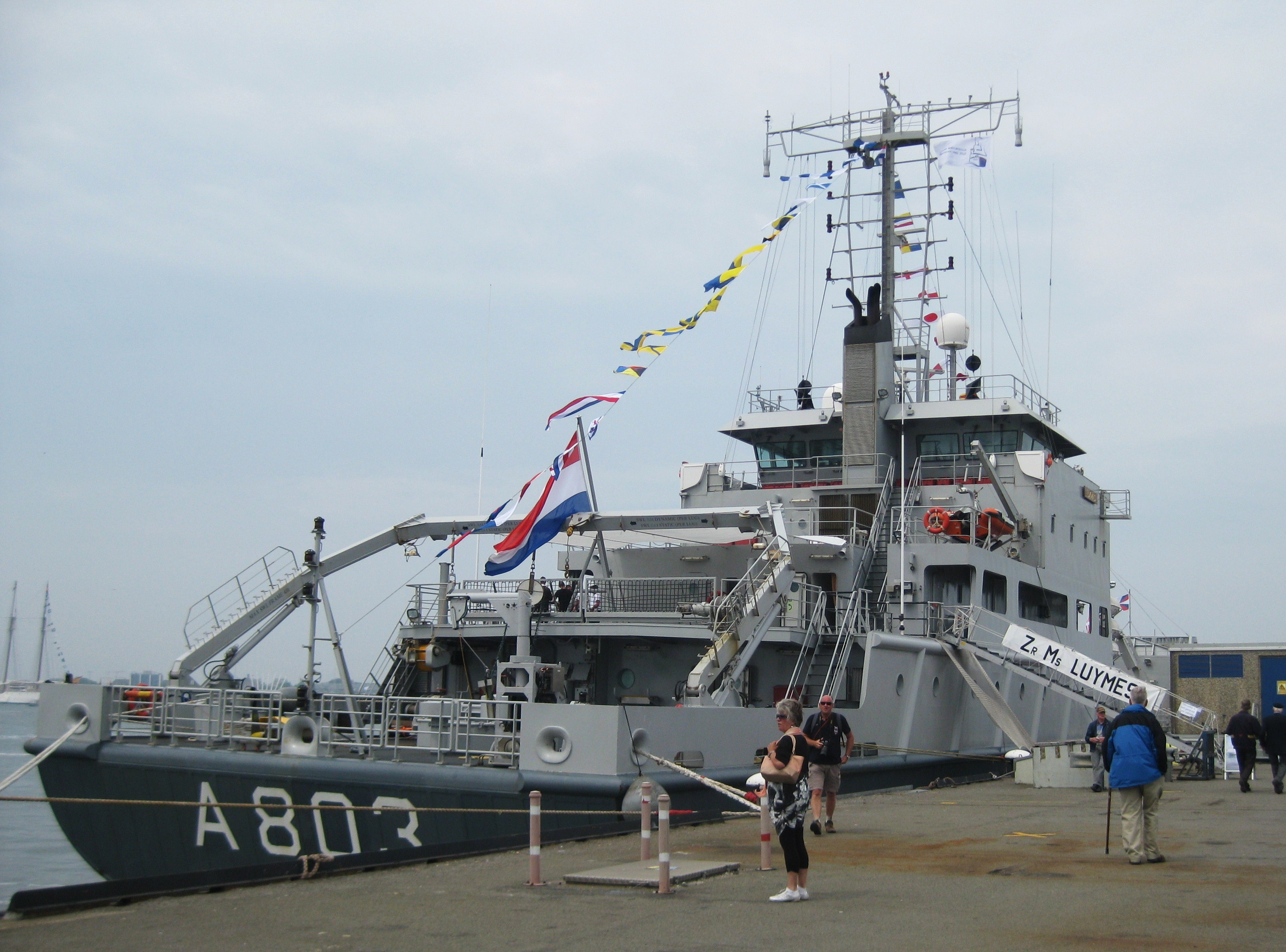 Zr. Ms. Luymes tijdens de Marinedagen 2013 in Den Helder Hydrografisch opnemingsvaartuig.